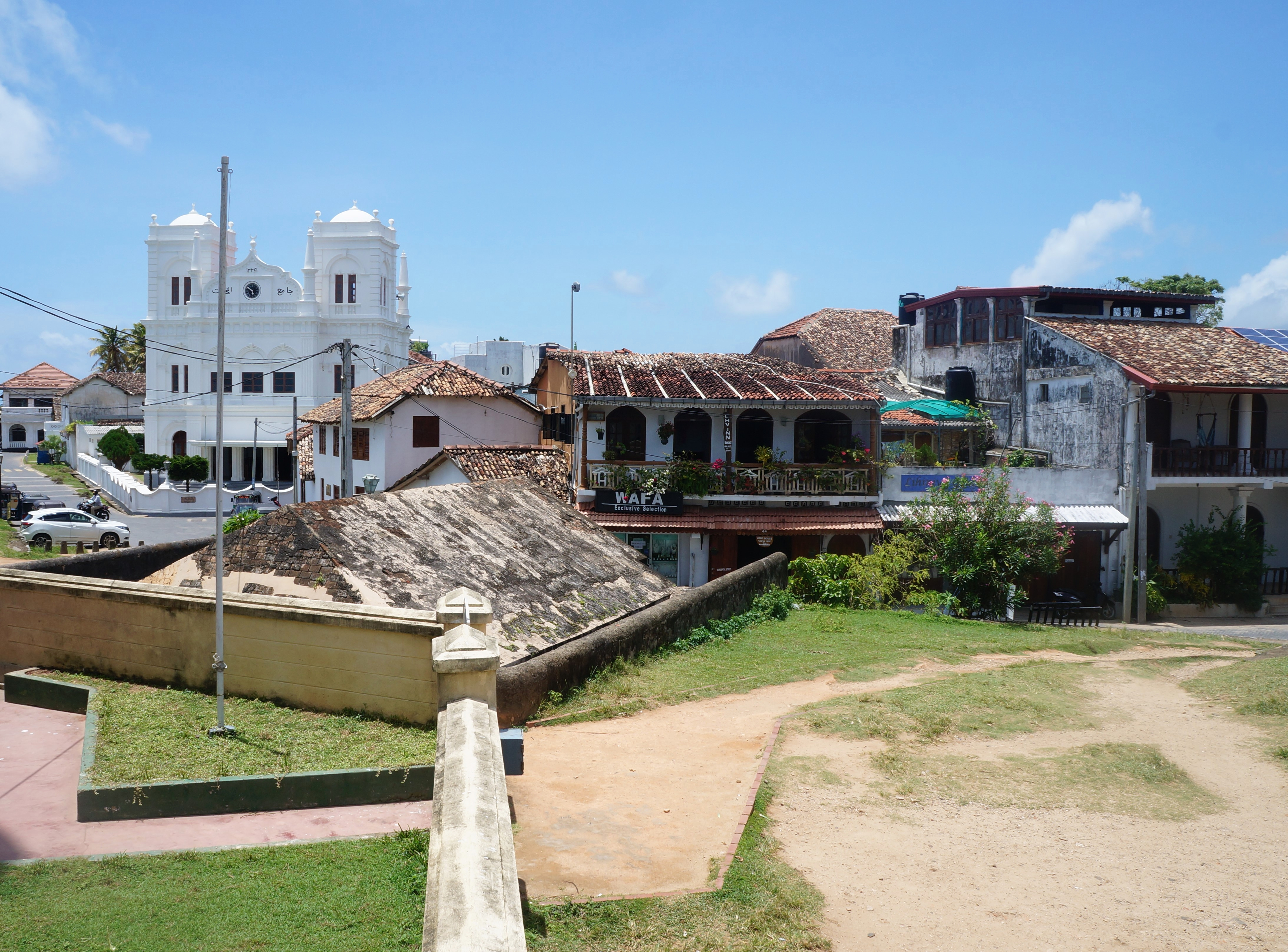 La Mosquée Meera Galle Sri Lanka.-Asie du Sud